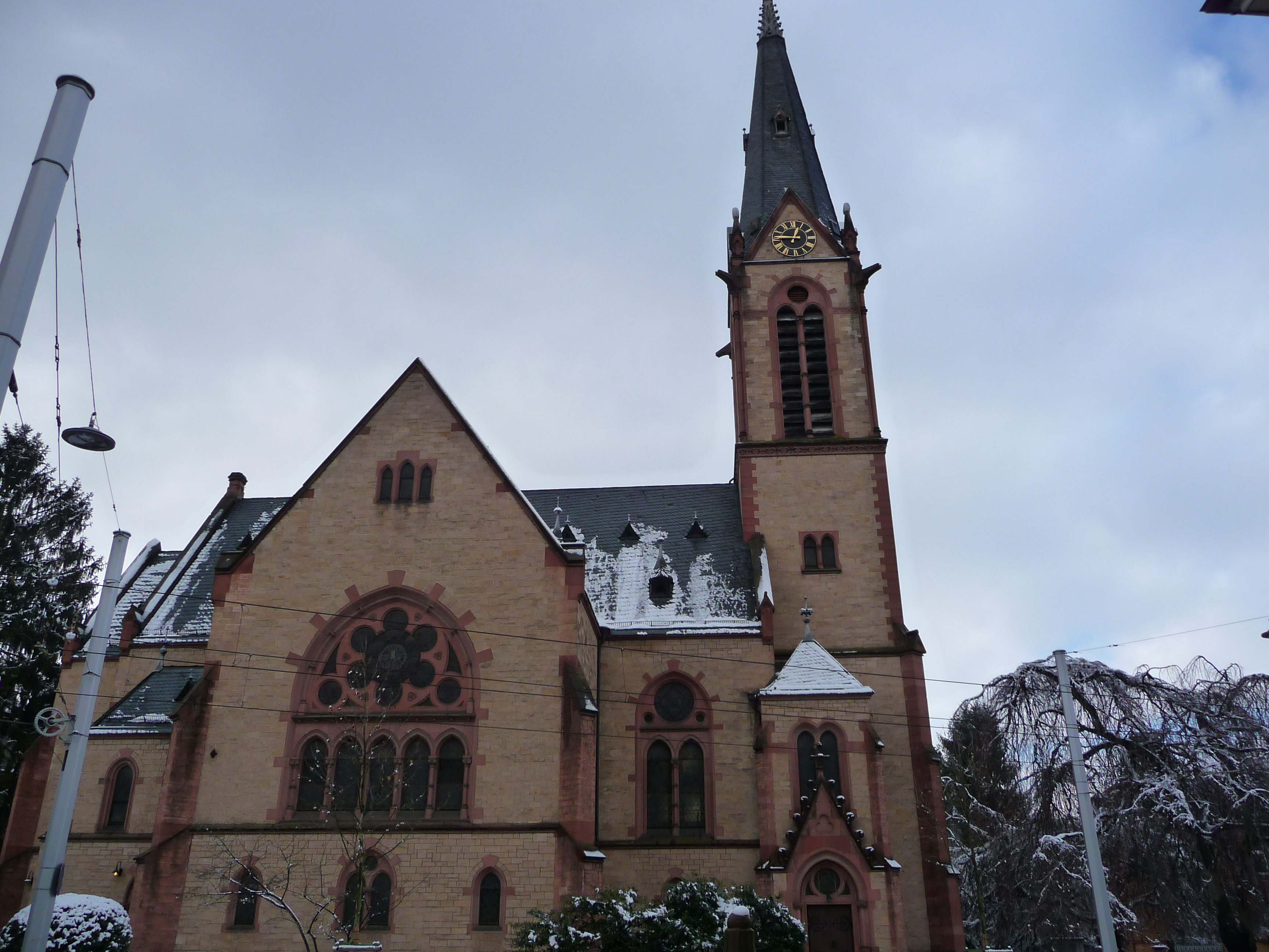 Evangelische Johanneskirche in Heidelberg-Neuenheim - Ansicht von Osten, Architekt: Hermann Behagel